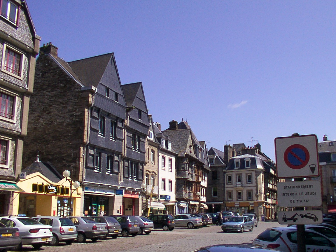 Place du centre, prise en 2006